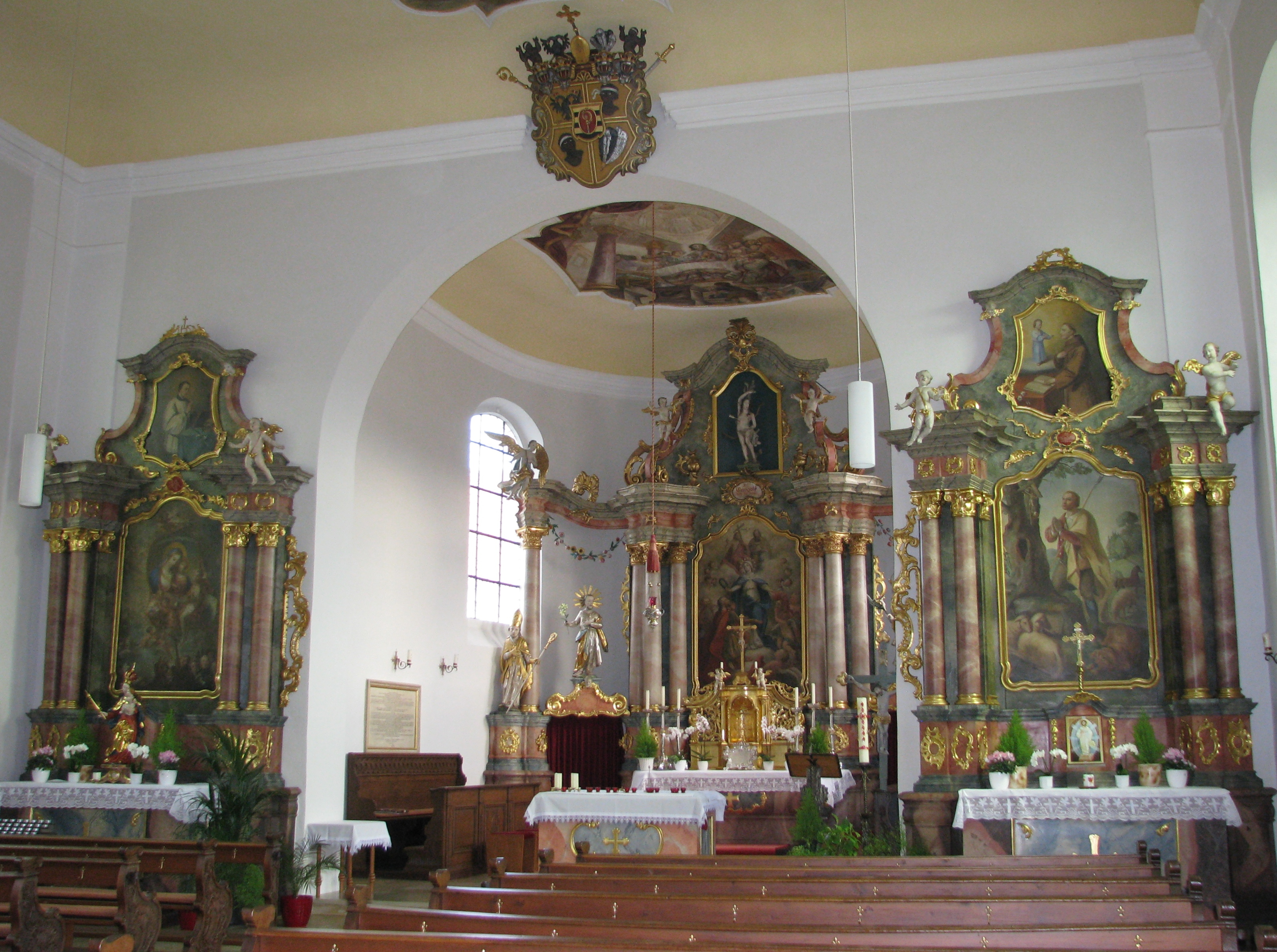 Burggriesbach, Ortsteil von Freystadt im Landkreis Neumarkt in der Oberpfalz in Bayern, Blick in die Pfarrkirche St. Gangolf